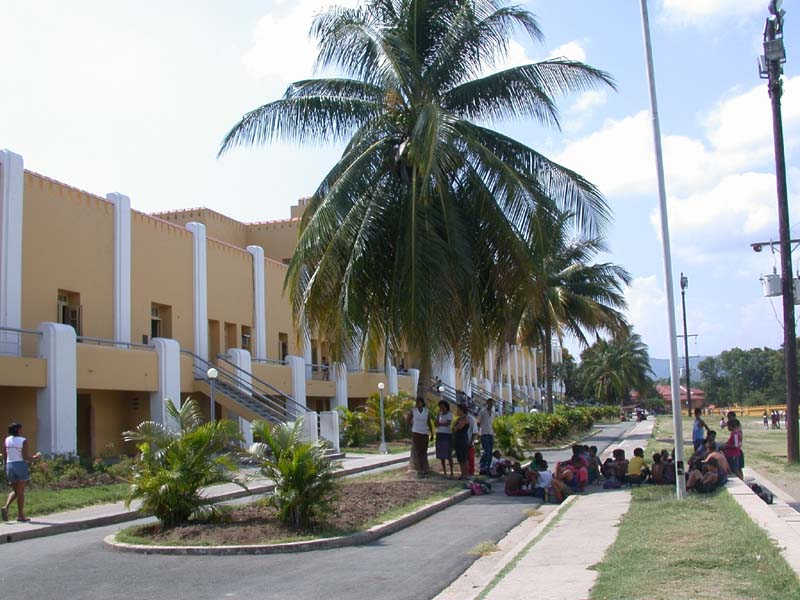 Schüler vor der Moncada-Kaserne Fotograf oder Zeichner: Benutzer:Aqarius-BRE Andere Versionen